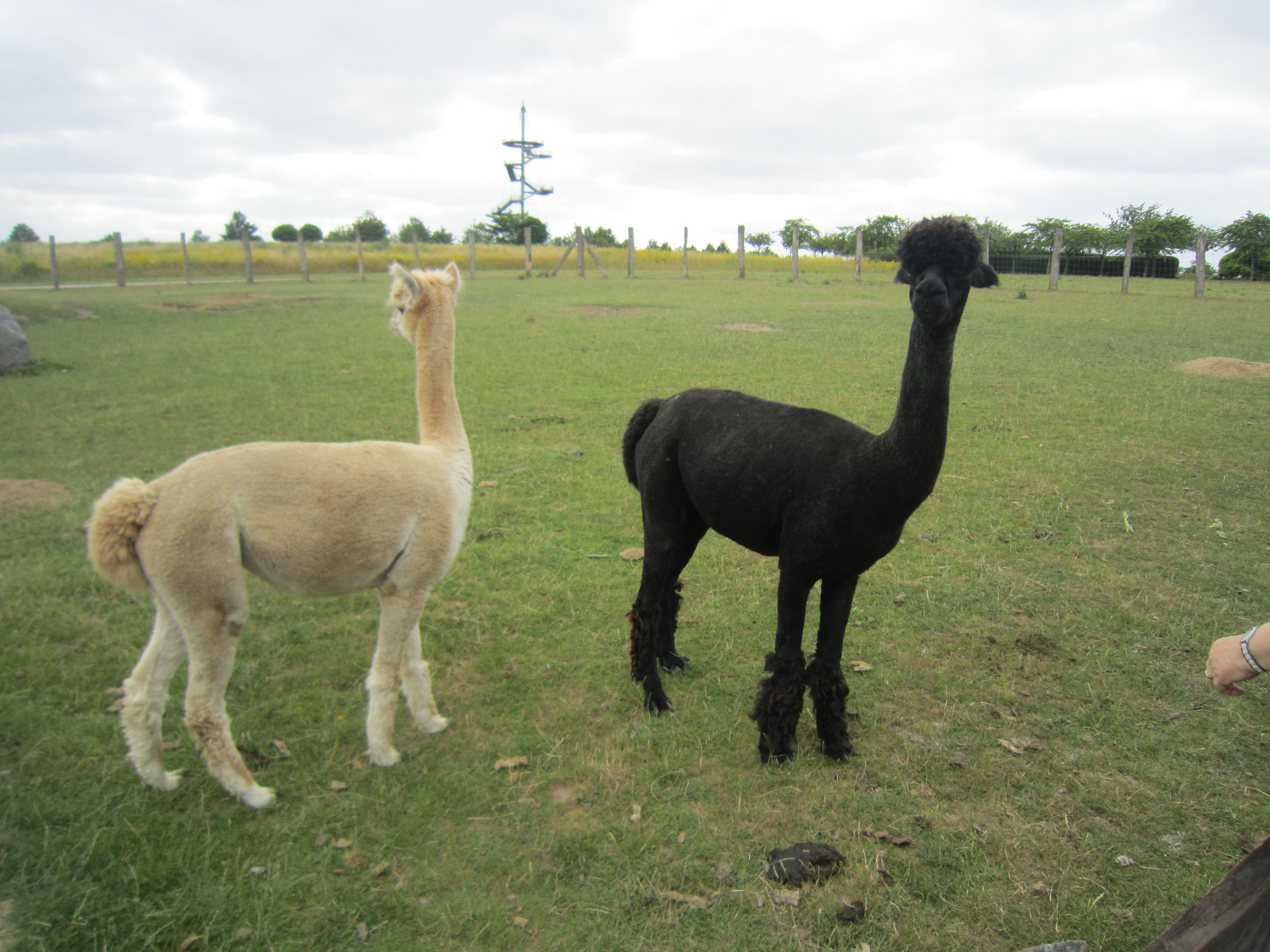 Alpakas in einem begehbaren Freigehege im Tierpark Wismar. Im Hintergrund der zur Landesgartenschau Mecklenburg-Vorpommern 2002 aufgestellte Aussichtsturm im Bürgerpark Wismar.